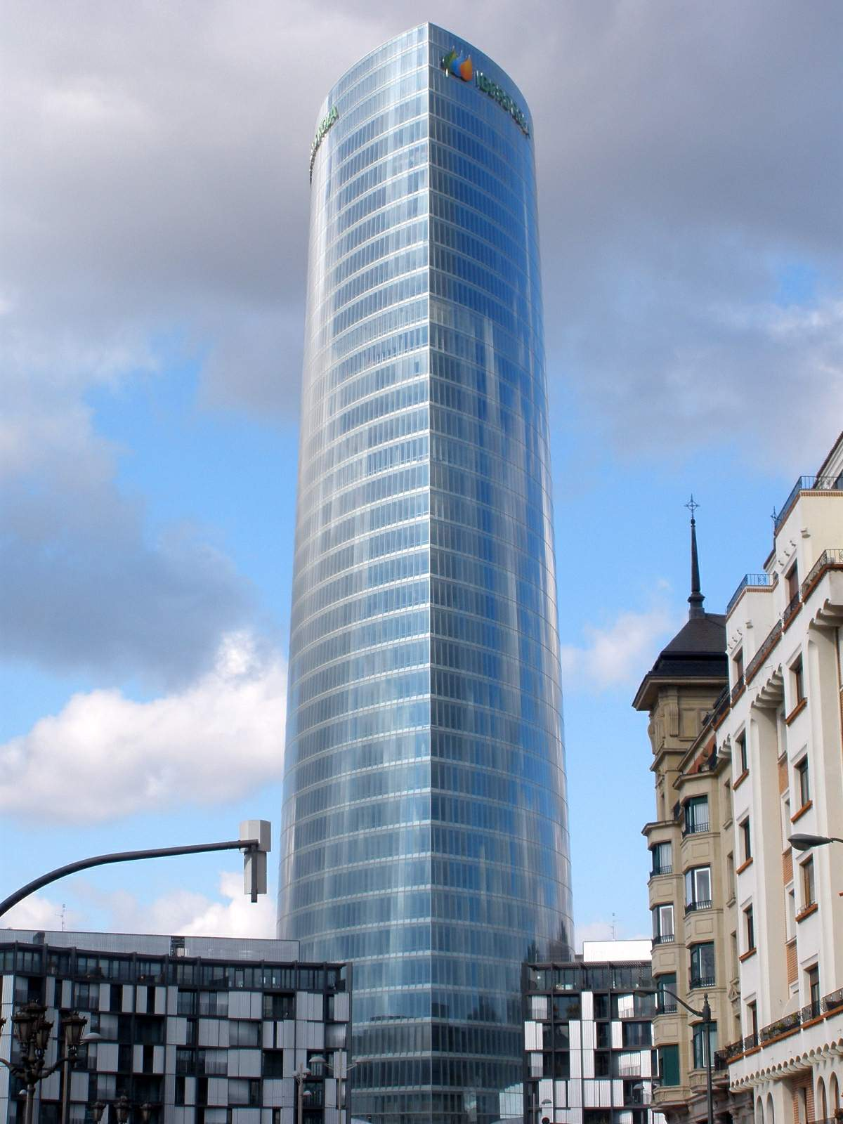 Iberdrola Tower, Bilbao